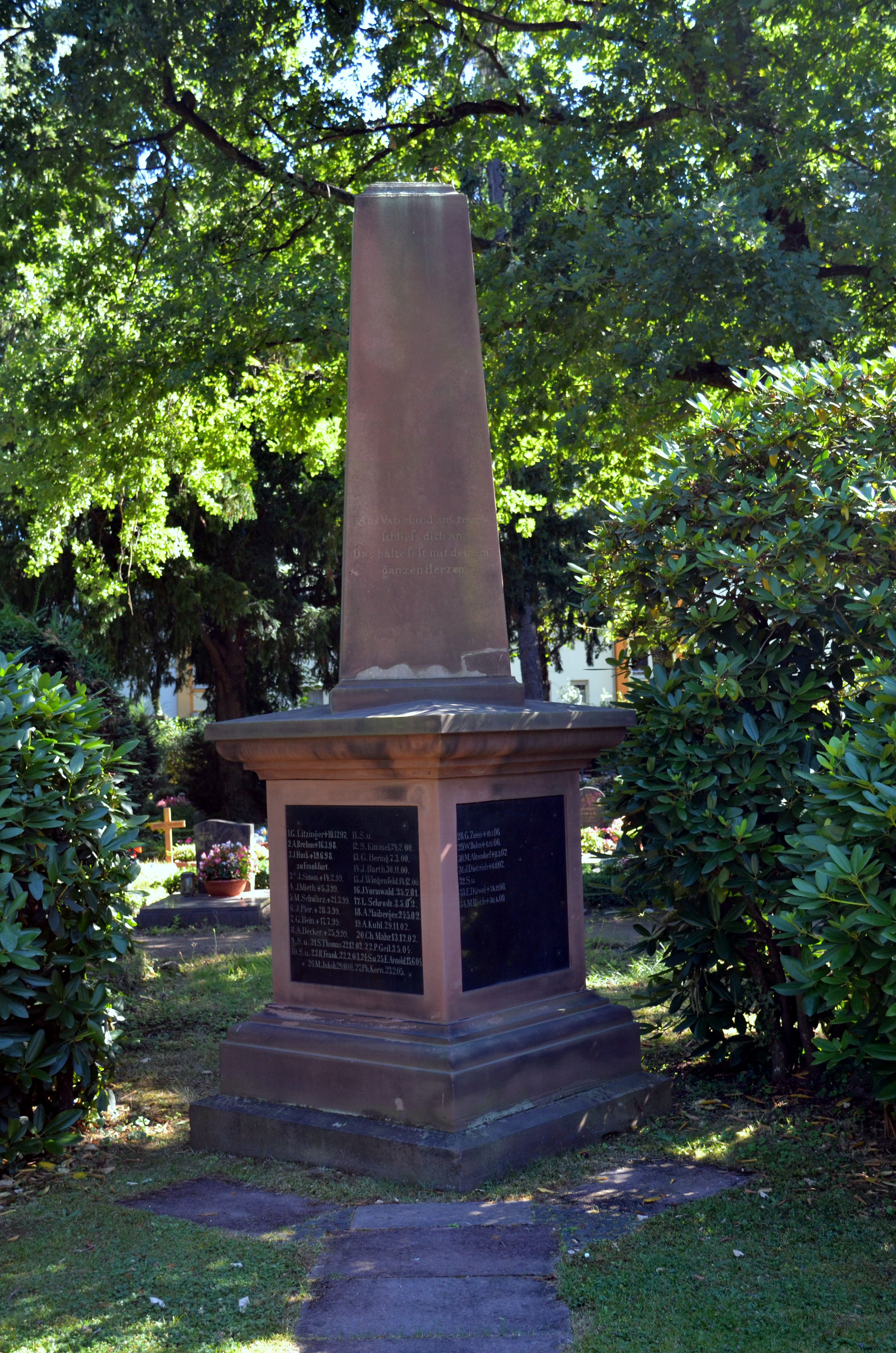 Griesheim, Friedhof, Obelisk